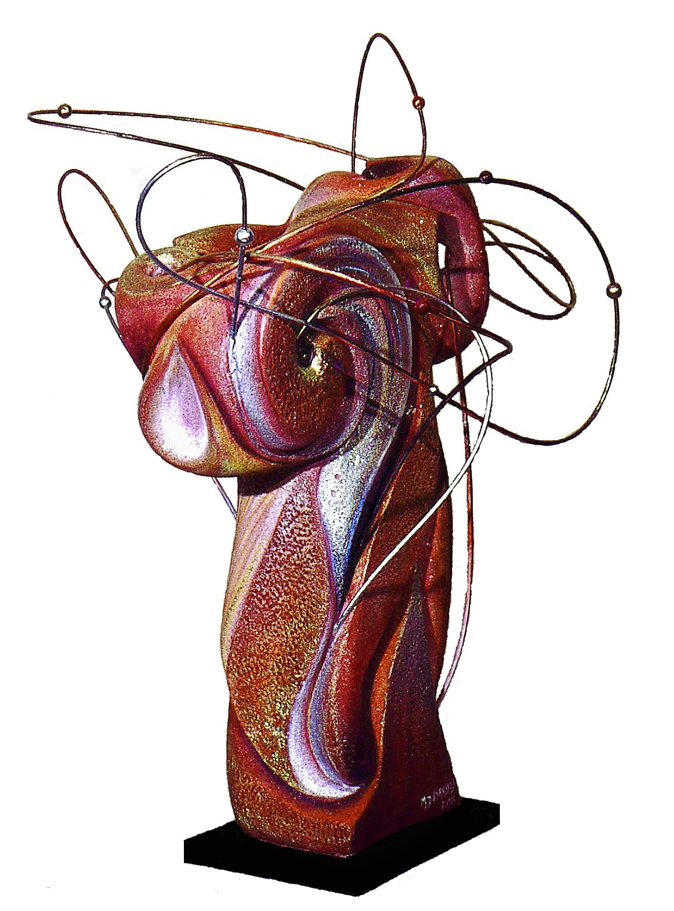 Il s'agit d'une sculpture en ytong avec adjonction de joncs, l'ensemble étant peint à l'huile.